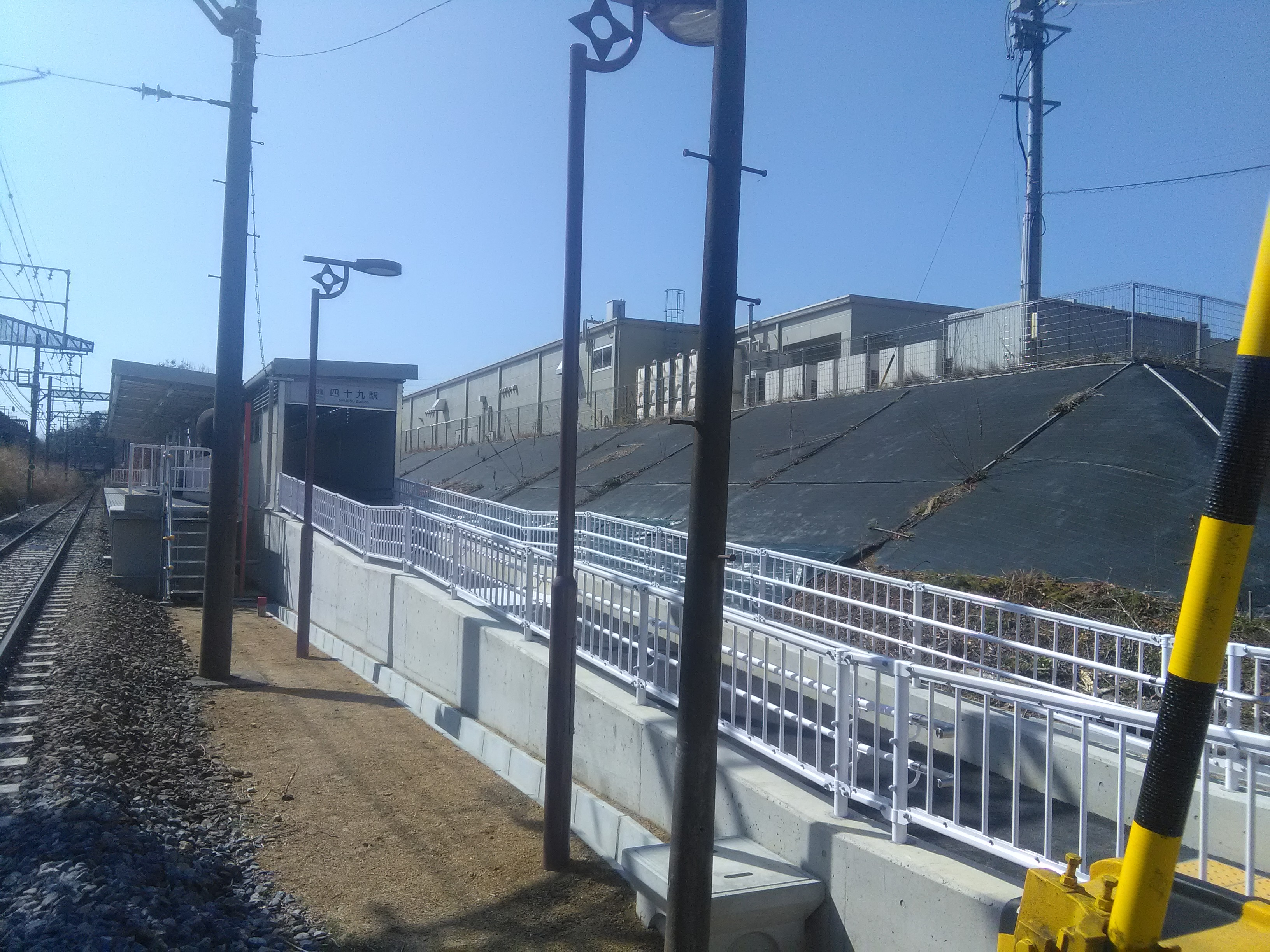 開業6日前の四十九駅。